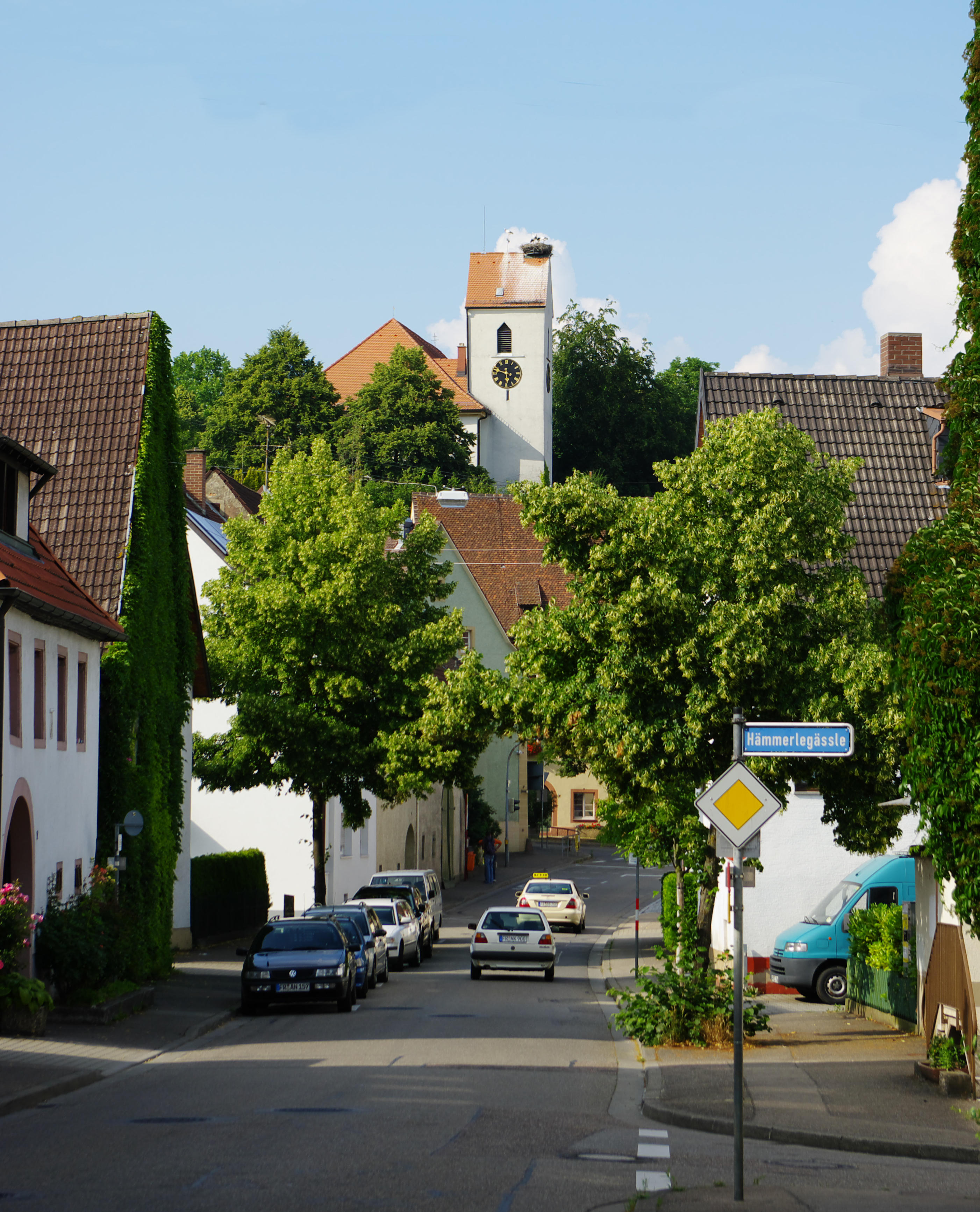 Blick auf die Ortsmitte von Opfingen